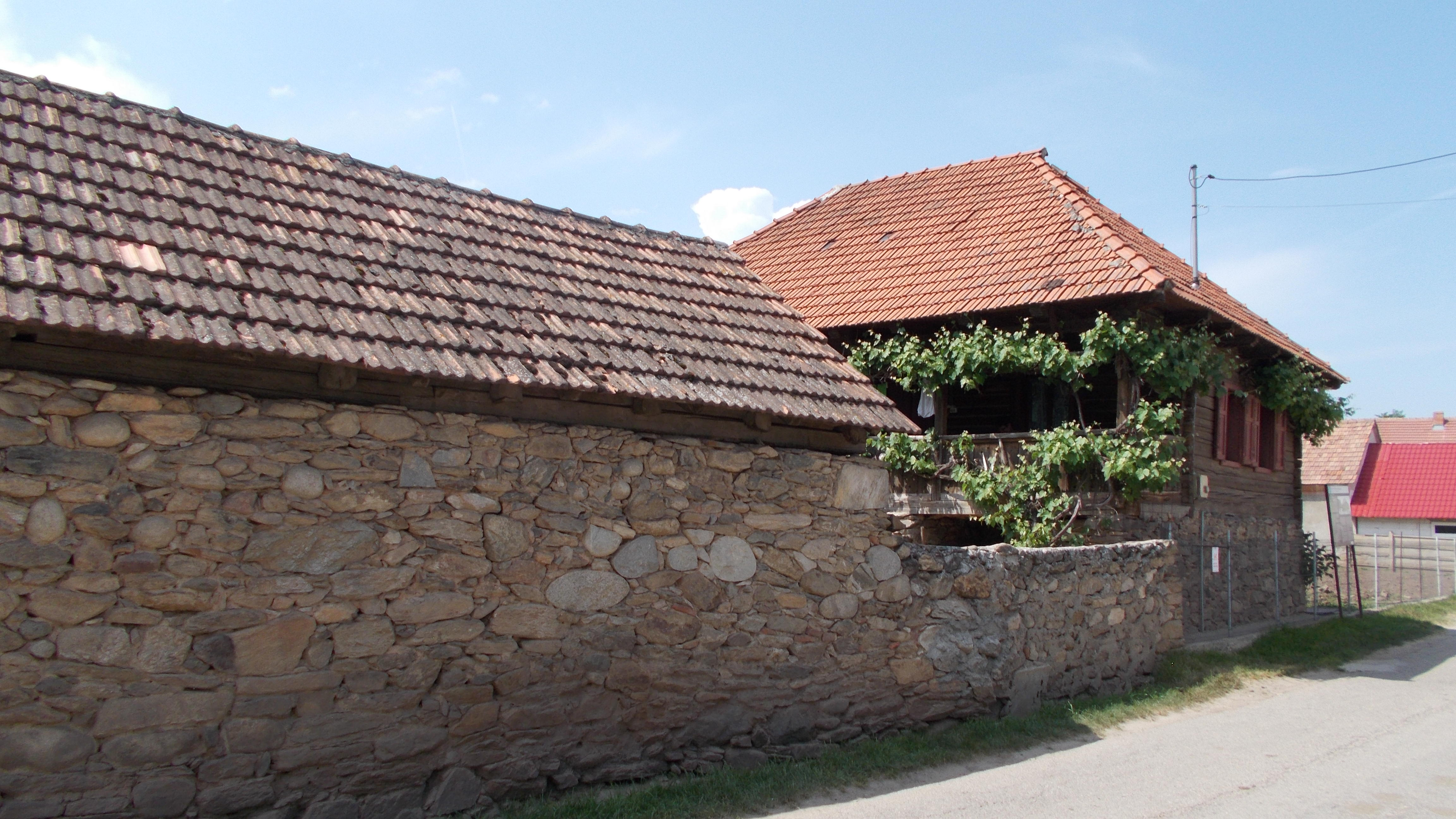 Casă de lemn (Tomoni Borcan) din Clopotiva